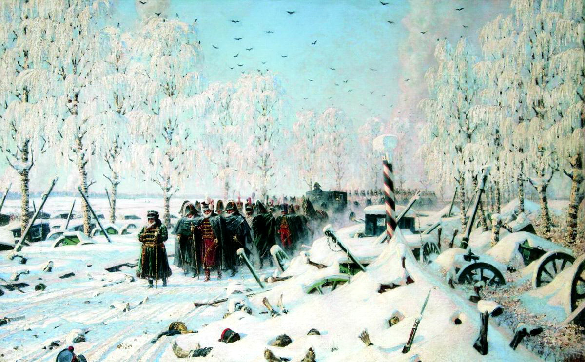 На большой дороге. Отступление, бегство